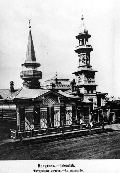 г. Иркутск. Соломатинская улица Мечеть.